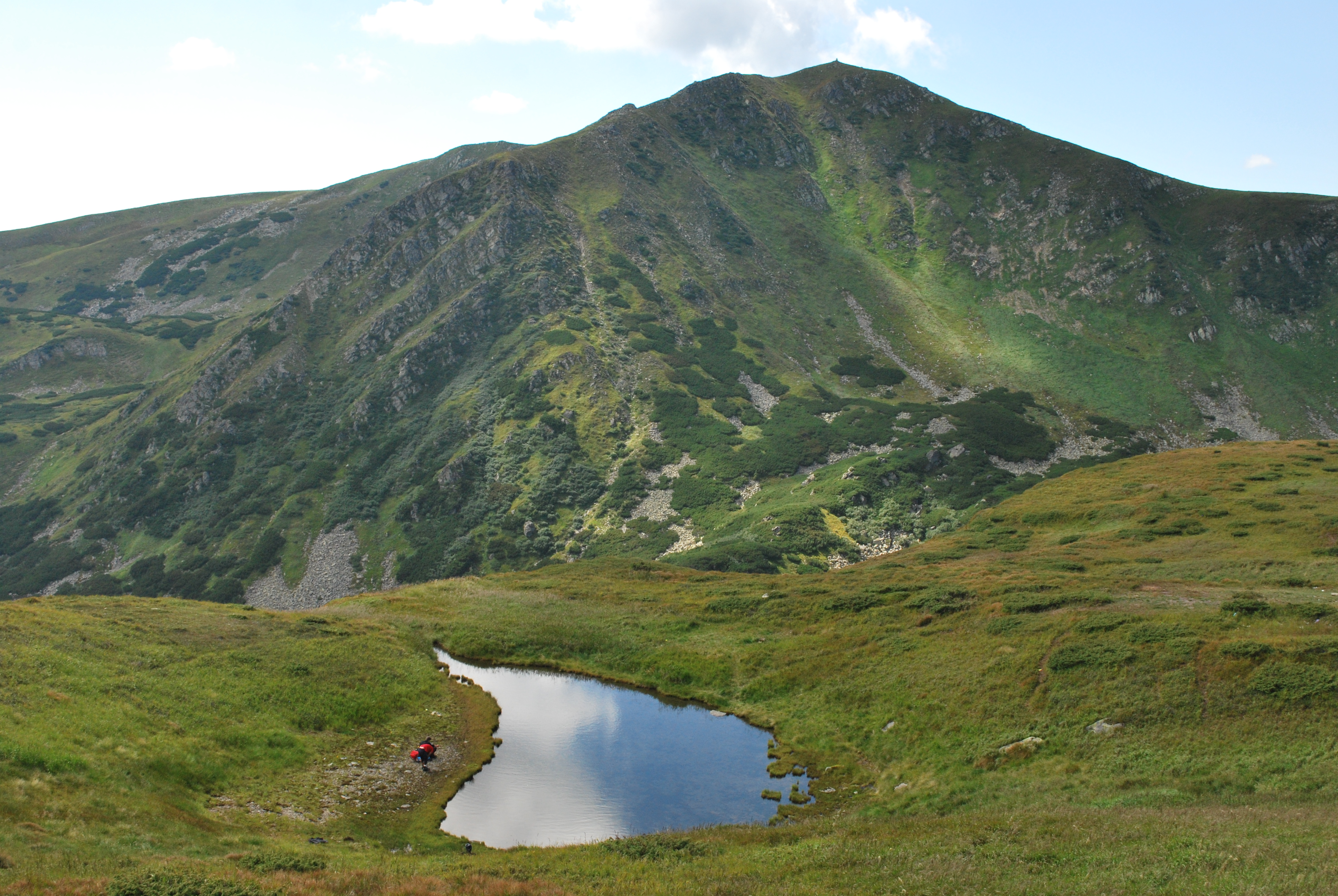 Ведмедиці - загальний вид зі сходу 2016